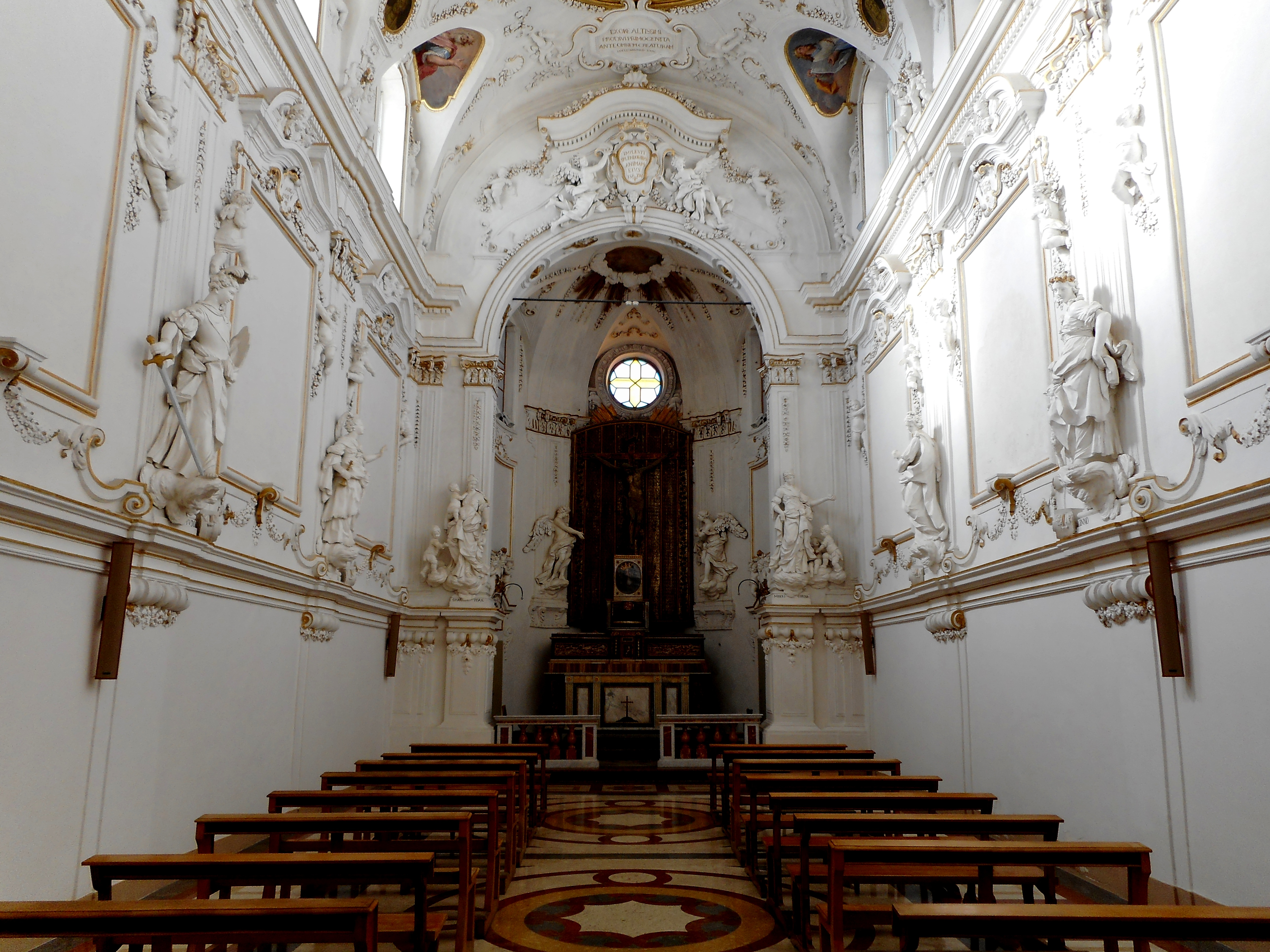 Oratorio del Sabato nel complesso di Casa Professa